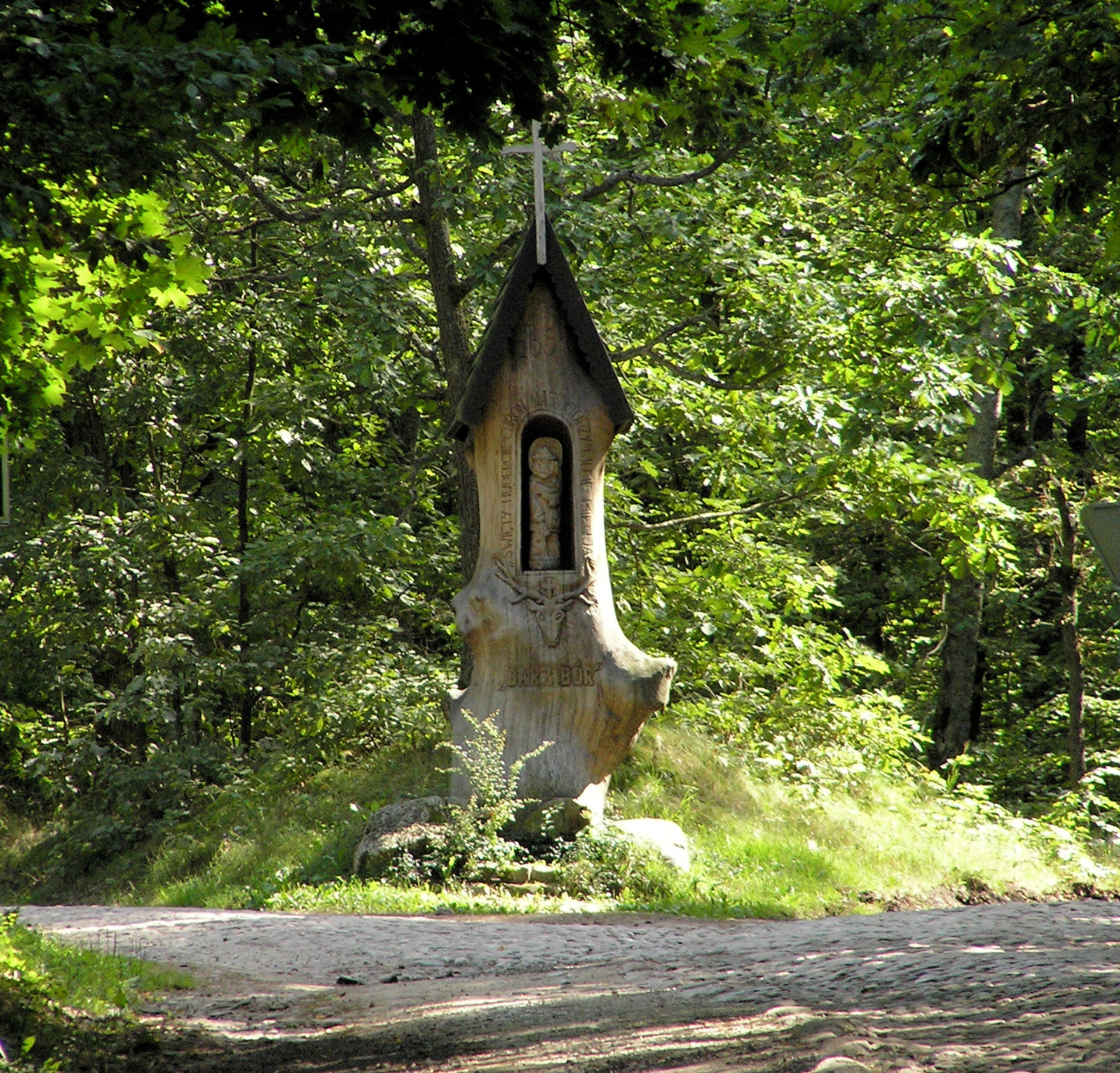 Świt - kapliczka Św. Huberta.